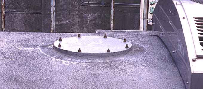 仙石線103系のグローブ形ベンチレータ撤去跡